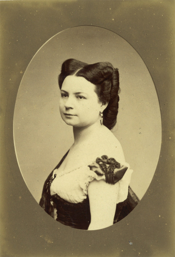 Emma Pauwels comtesse Osmont du Tillet (1828-1883)